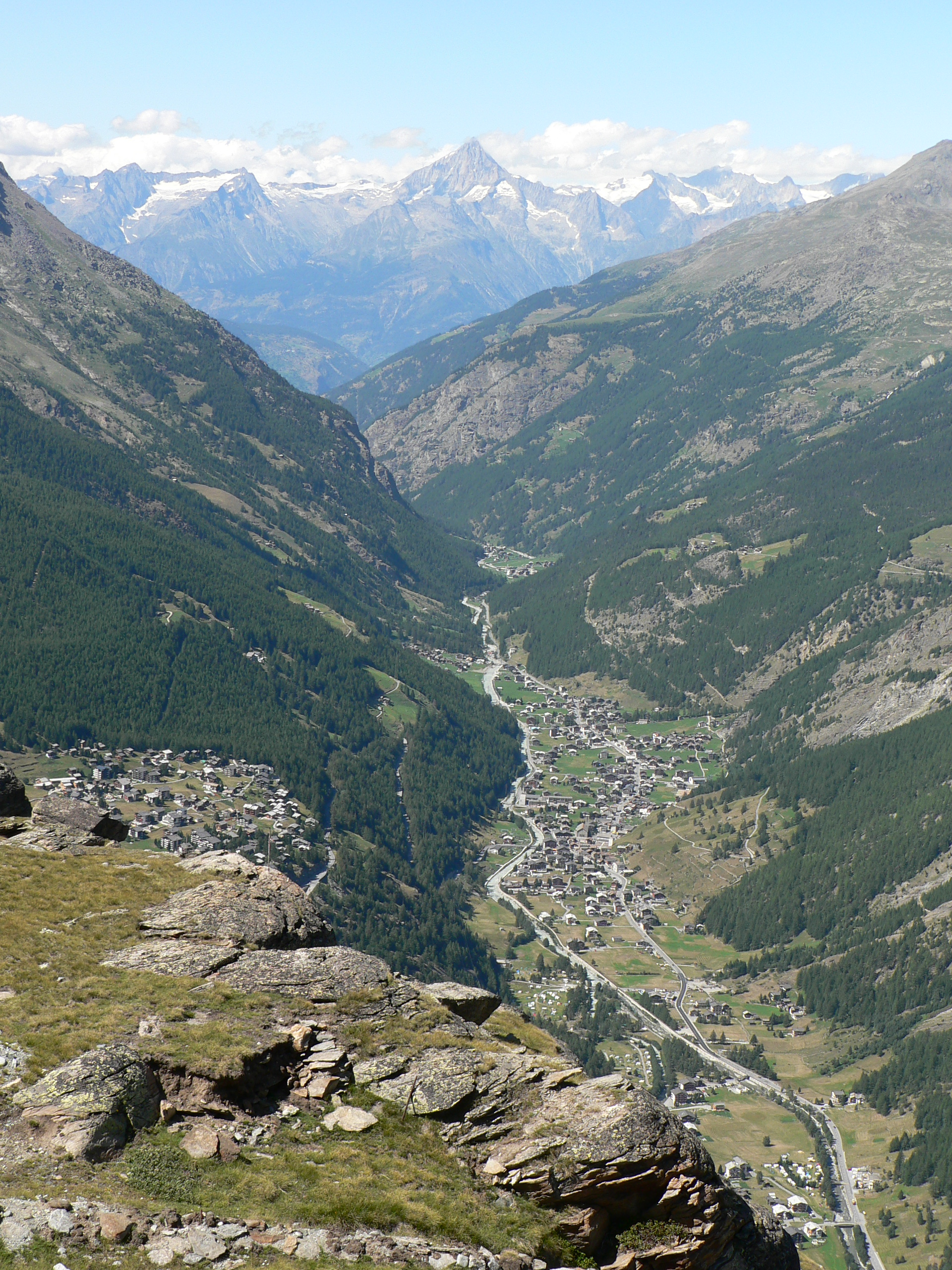 Saas-Grund and Saas-Fee (on left side), Swiss villages